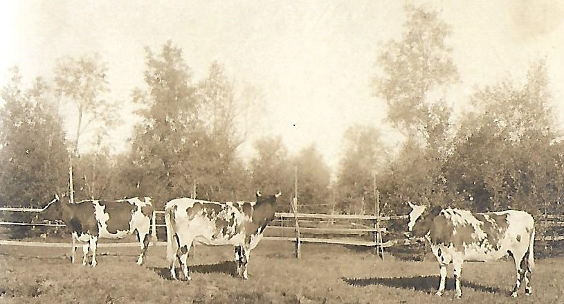 1940-luvun lopulla